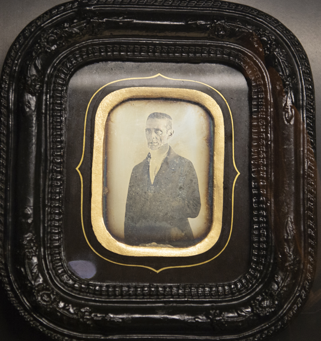 Joaquín Luis Miguel Suárez de Rondelo y Fernández, Daguerrotipo tomado de una exposición en Montevideo el 6 de octubre de 2019. Evidentemente, por su antiguedad la foto, el Daguerrotipo, ya se encuentra en el dominio público. La foto fue tomada del Daguerrotipo original.